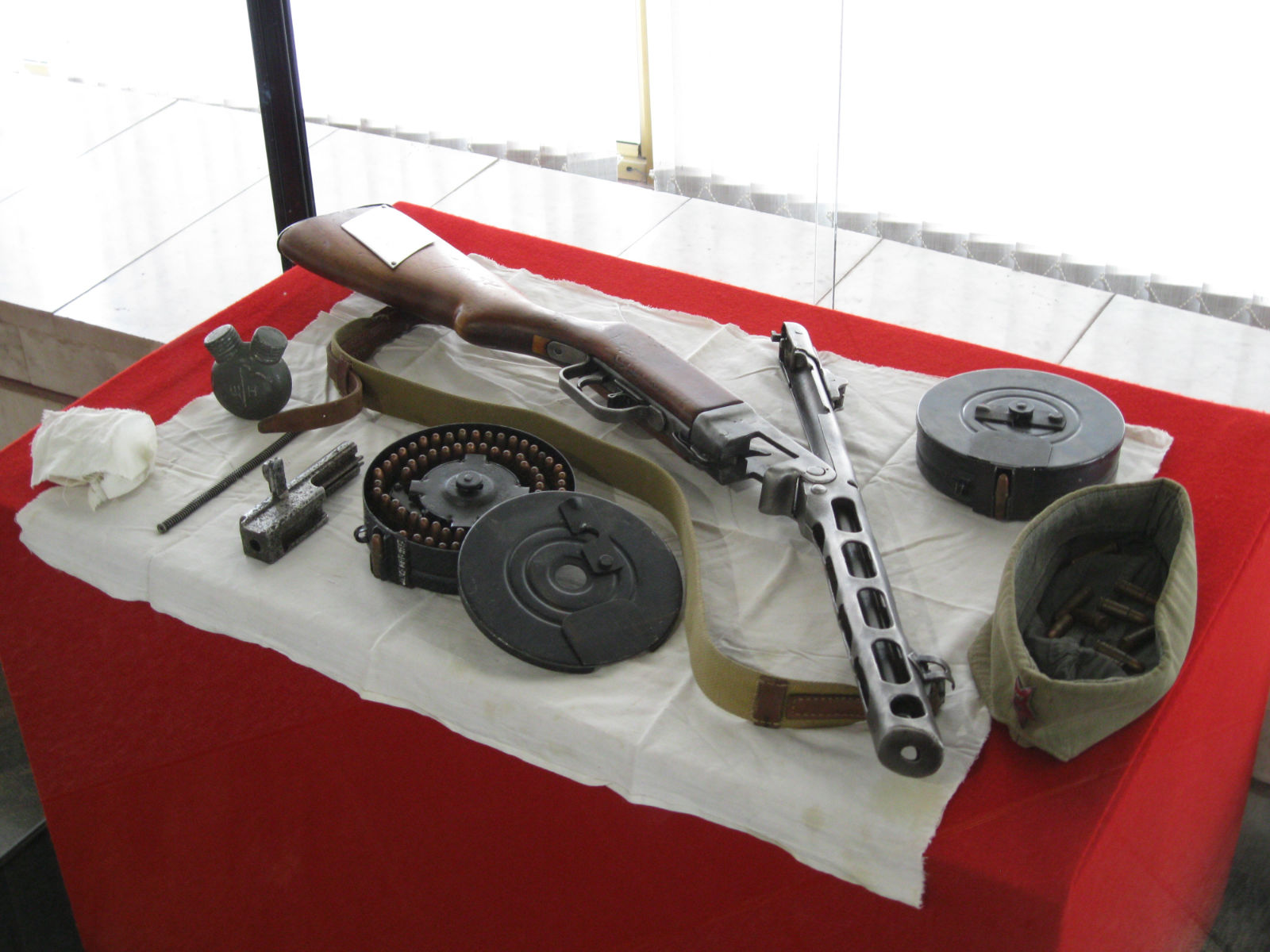 Экспонаты музея-панорамы «Сталинградская битва». ППШ-41